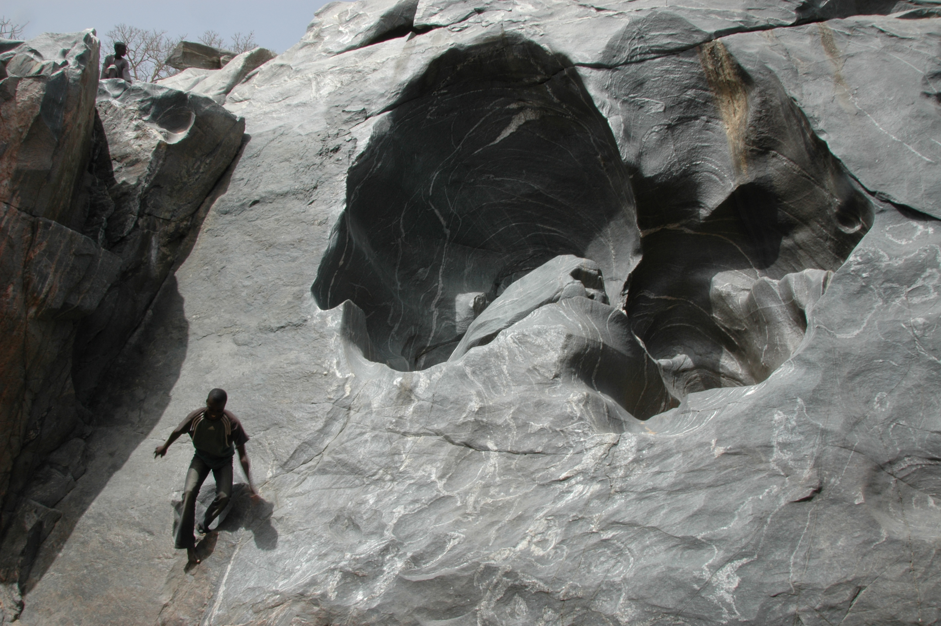 Les Gorges de Kola, accessibles seulement en saison sèche. En effet, lorsque le rivière est pleine, on ne voit pratiquement pas ces rochers étranges et il vaut mieux ne pas essayer de traverser à cet endroit, de peur de buter sur ces rochers ou de tomber dans ces grottes